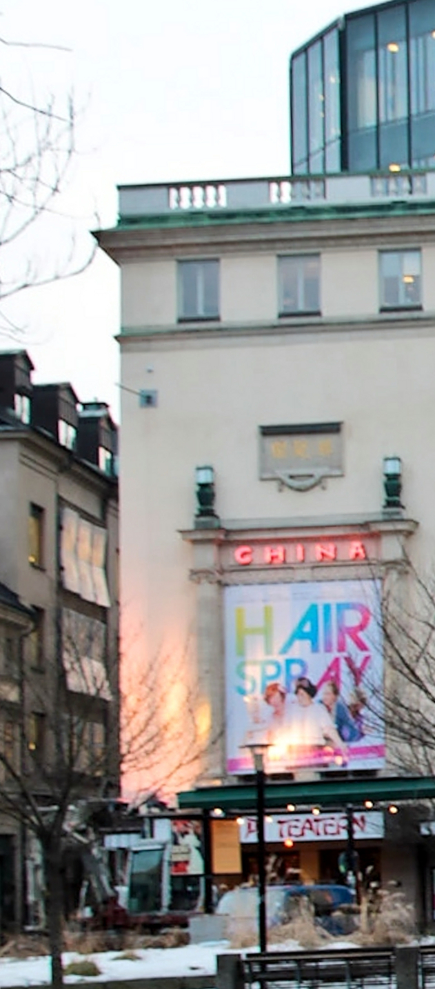 Das Chinateatern in Stockholm, Schweden.